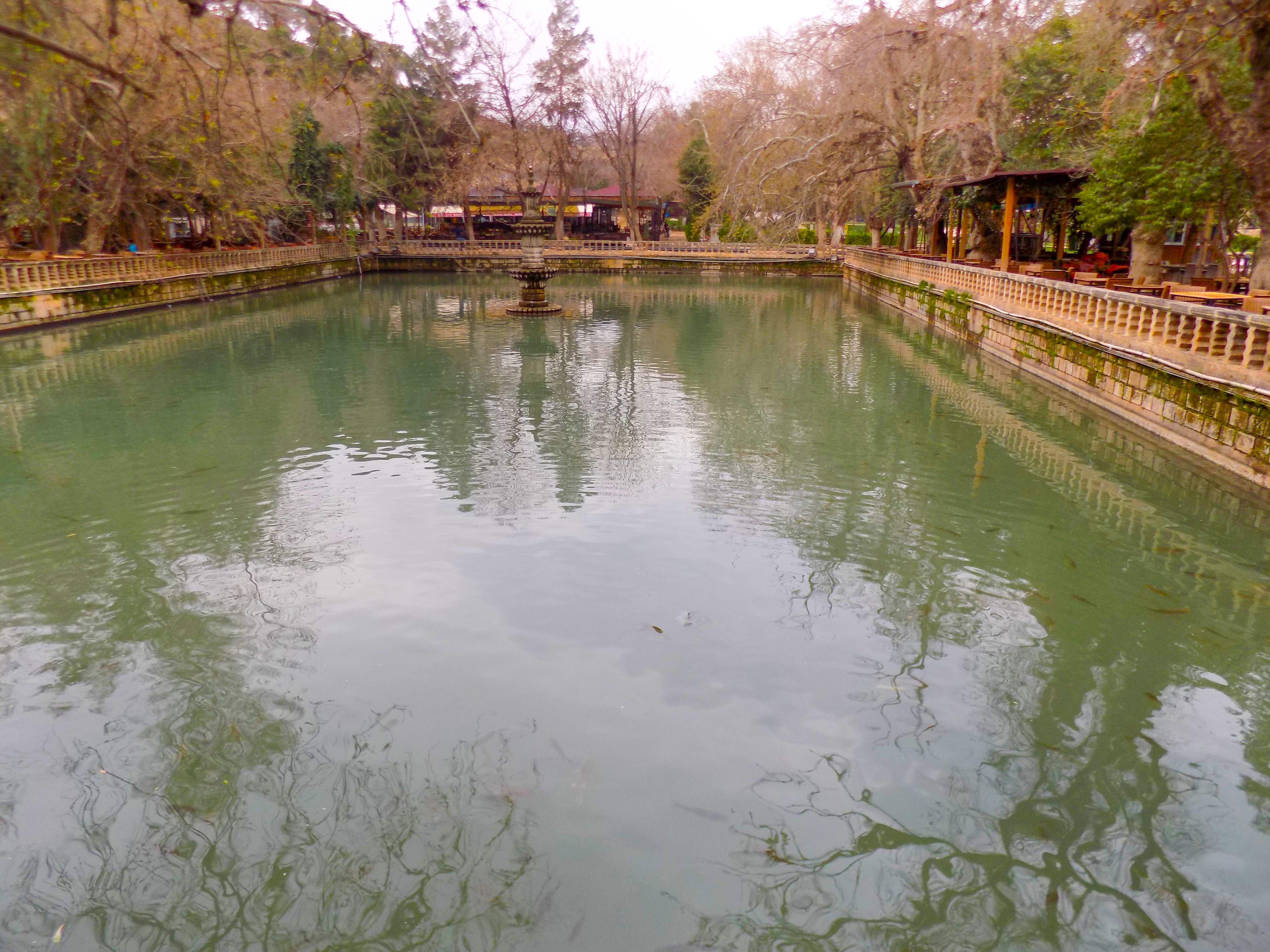 Şanlıurfa'nın Eyyübiye ilçesindeki Aynzeliha Gölü'nden bir görünüm. Efsaneye göre İbrahim'in ateşten kurtulma mucizesini gören kralın kızı Zeliha, İbrahim'in davetini kabul ederek babasının ilahlığını yüzüne karşı reddeder. Öfkelenen Nemrut kendi eliyle kızını ateşe atar ve kızının diri diri yanarak ölüşünü seyreder. Zeliha'nın düştüğü yerde bir göl ve bu gölün içinde balıklar oluşur. O günden bu güne Zeliha'nın düştüğü yere Zeliha'nın Pınarı ya da Zeliha'nın Gözyaşı anlamına gelen Aynzeliha denmektedir. İçerisindeki balıkların da kutsal olduğunu inanıldığından yenmemektedir.